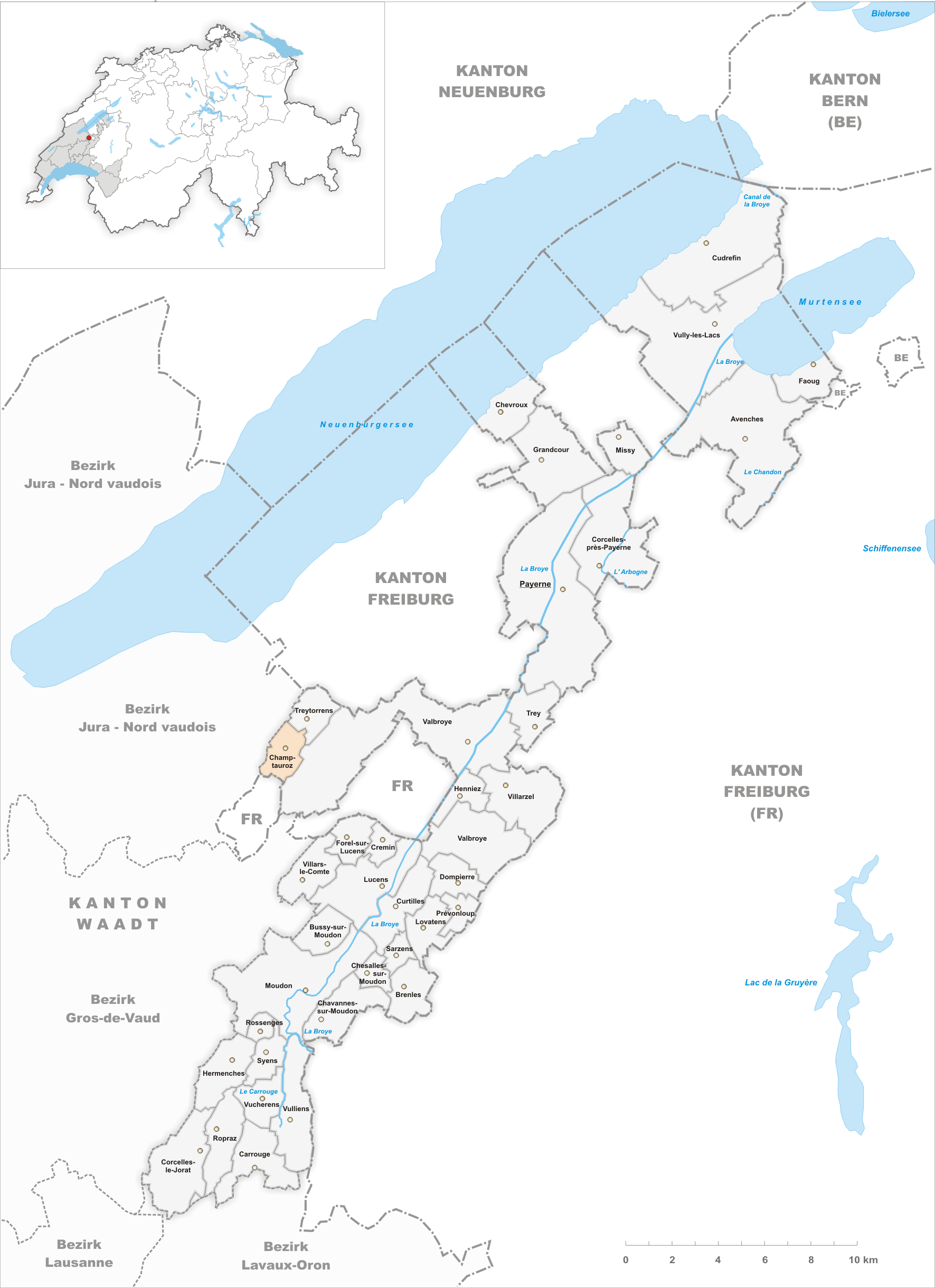 Municipality Champtauroz